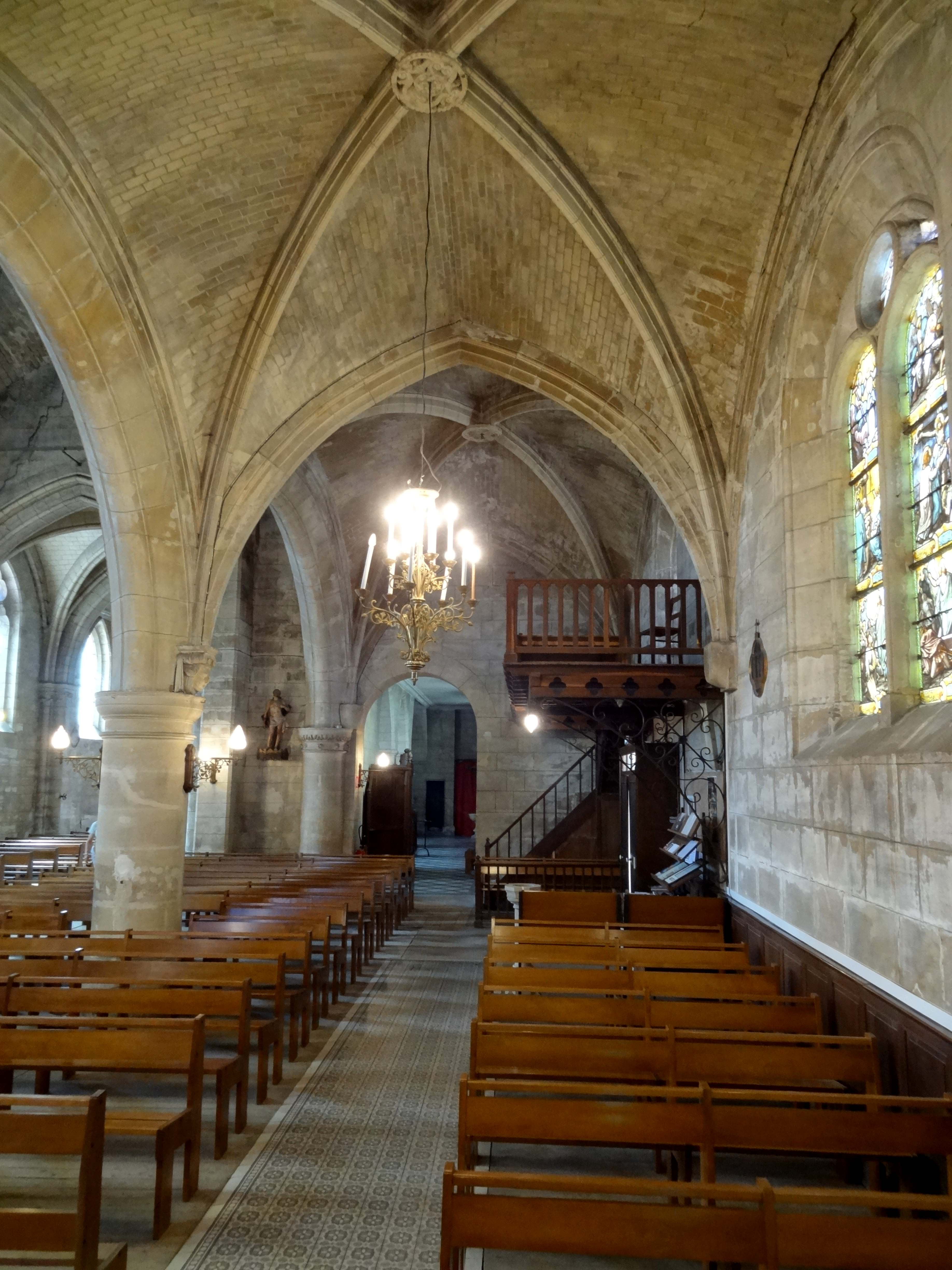 Intérieur de l'église - voir titre.